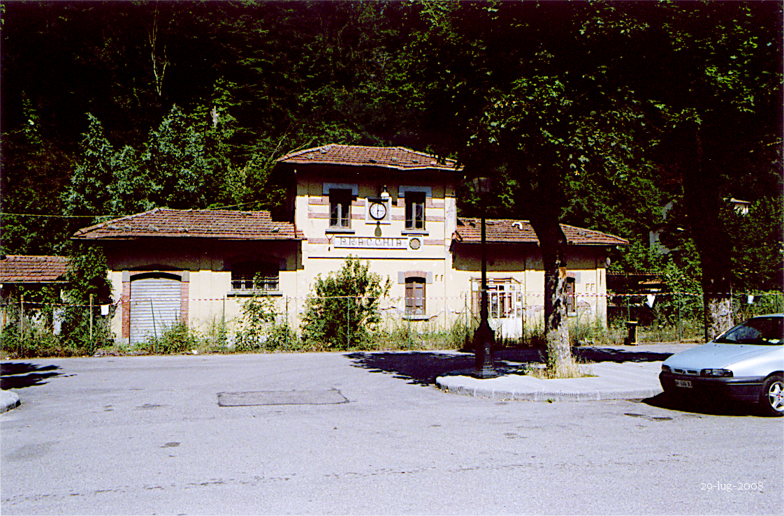 La stazione ferroviaria della FAP. Ripresa del 29 luglio 2008 con clone Pentax reflex, grandangolo 28 mm fisso e pellicola a 800 ISO. Fatto da me.